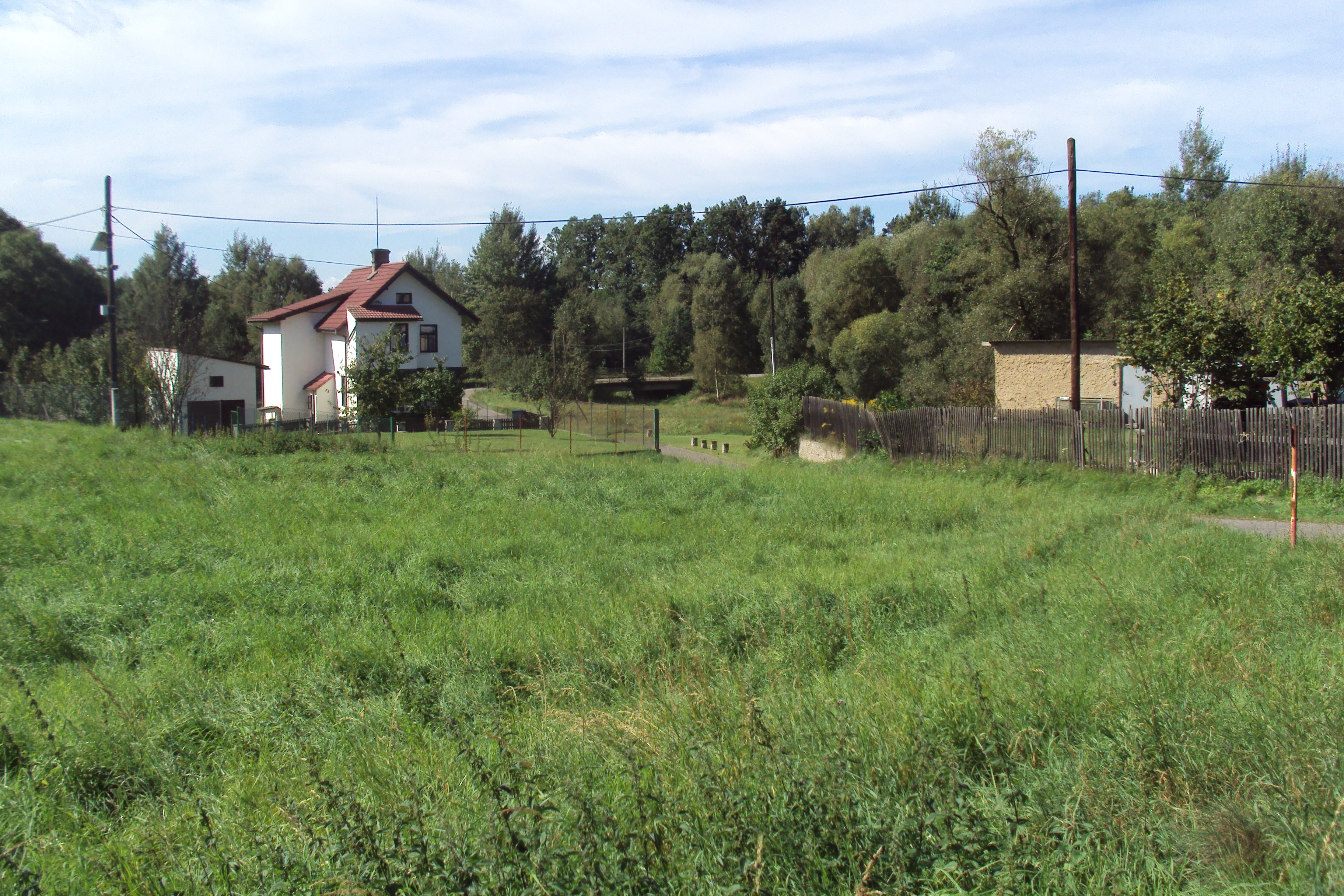 Jedno ze stavení vesničky Srní Potok